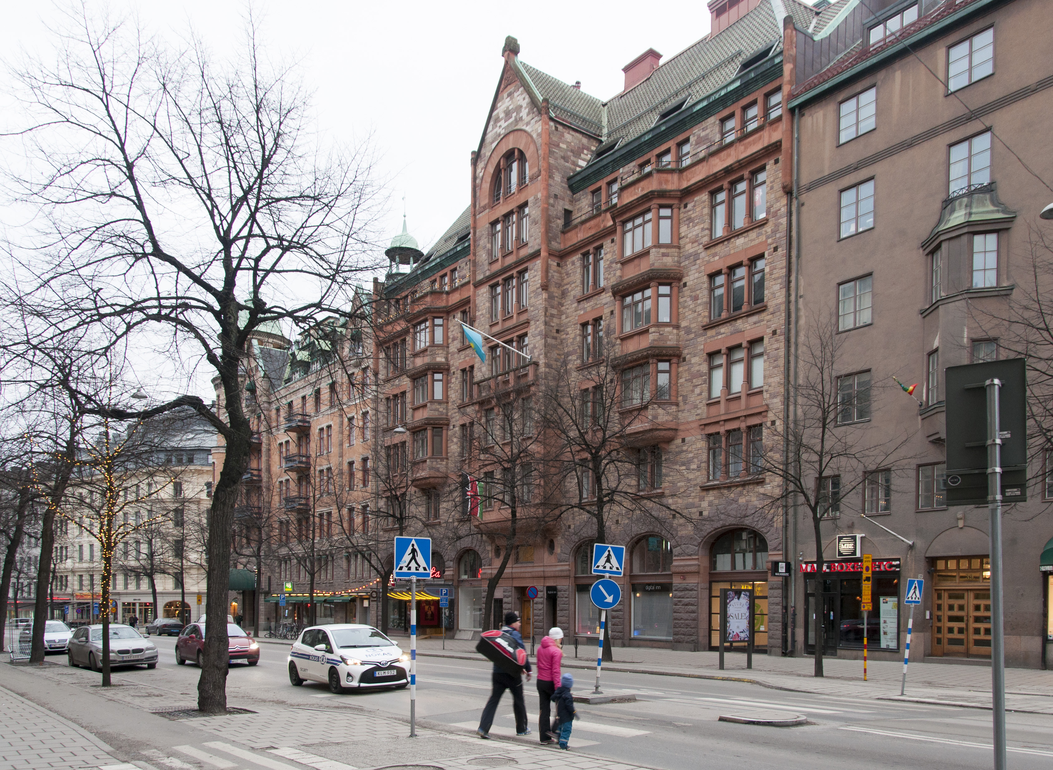 Italien Större 12, Birger Jarlsgatan 37 Stockholm Nybyggnadsår 1910 - 1912 Carl Gustaf Ohlsson (Byggmästare) Carl Gustaf Ohlsson (Byggherre) Hagström & Ekman (Arkitekt) J. A. Lundgren (Byggmästare)